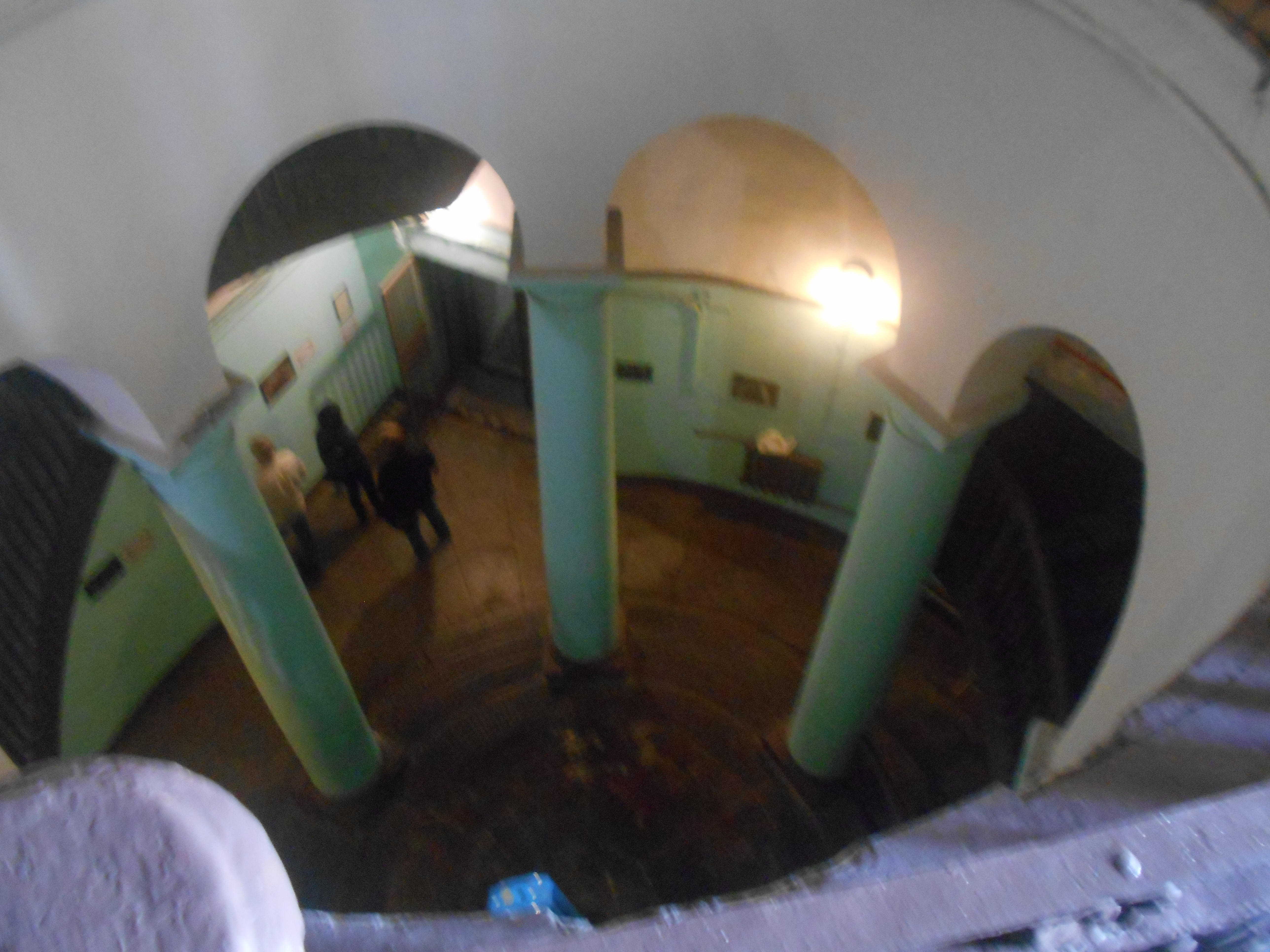 Ротонда